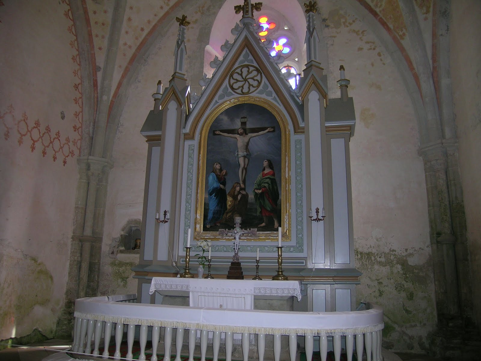 Karja kiriku altar